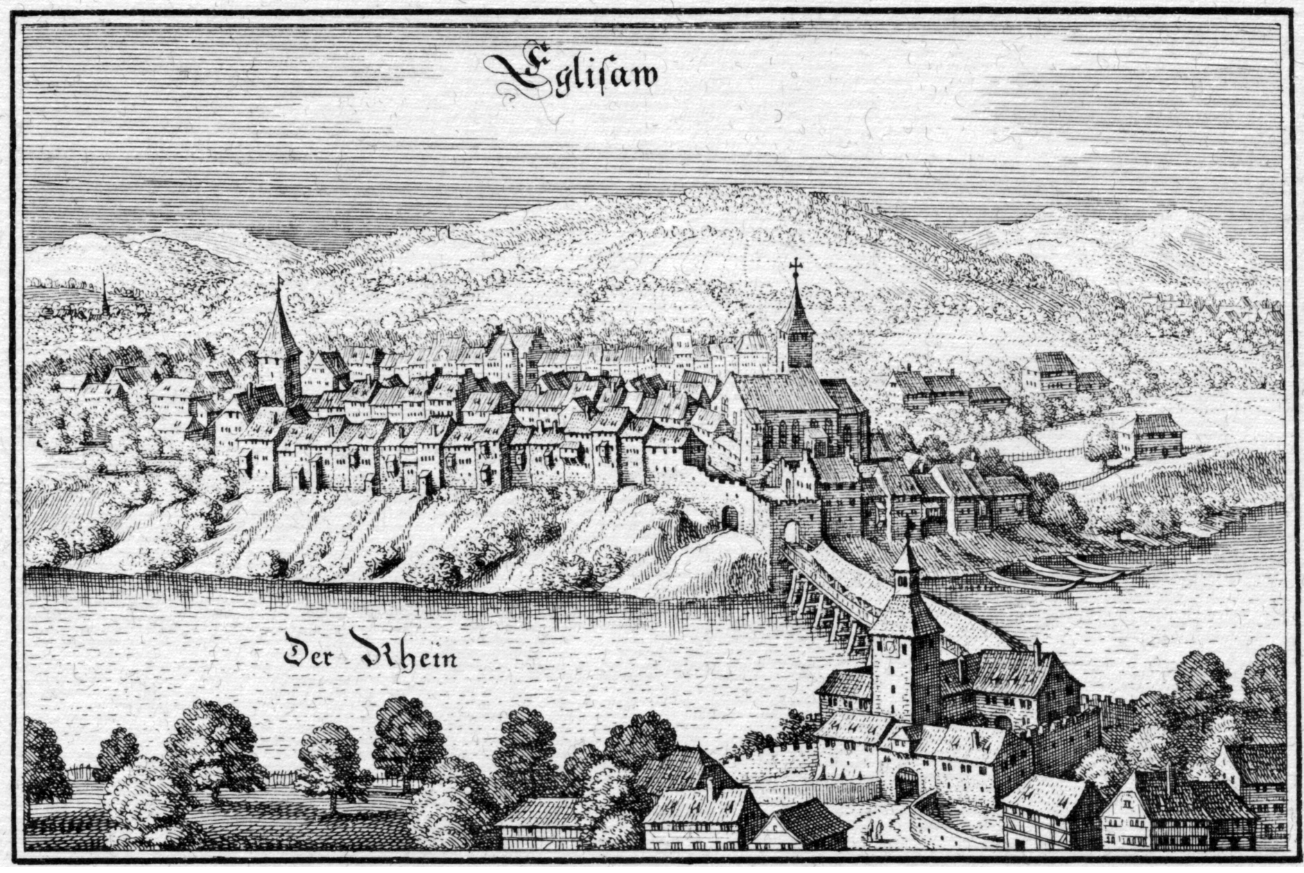 Die Stadt Eglisau im Kanton Zürich, Schweiz, in der Topographia Helvetiae von Matthäus Merian. Ca. 1650